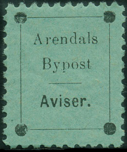 Газетная марка местной почты в Арендале (Норвегия), 1886